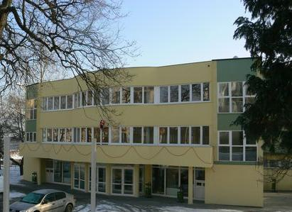 Tatabánya sportcsarnoka kívülről – Földi Imre Sportcsarnok (Ságvári Endre út)